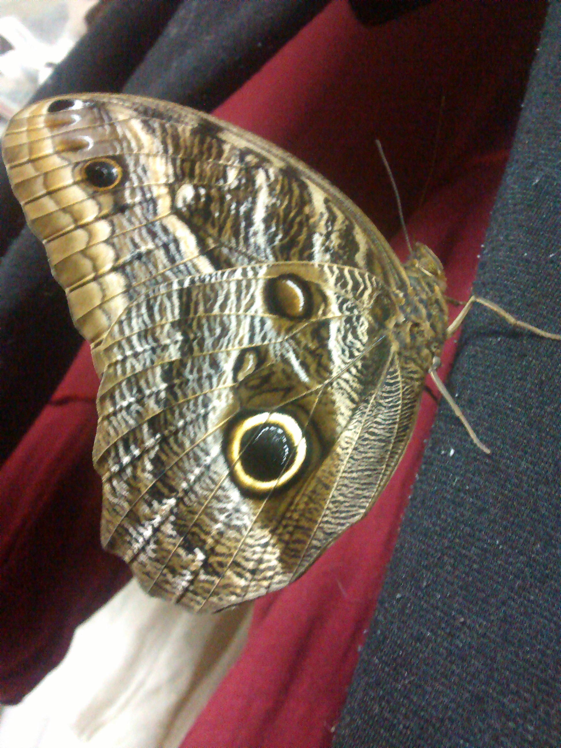 Caligo brasiliensis, não é a C. brasiliensis. O nome do arquivo está errado.